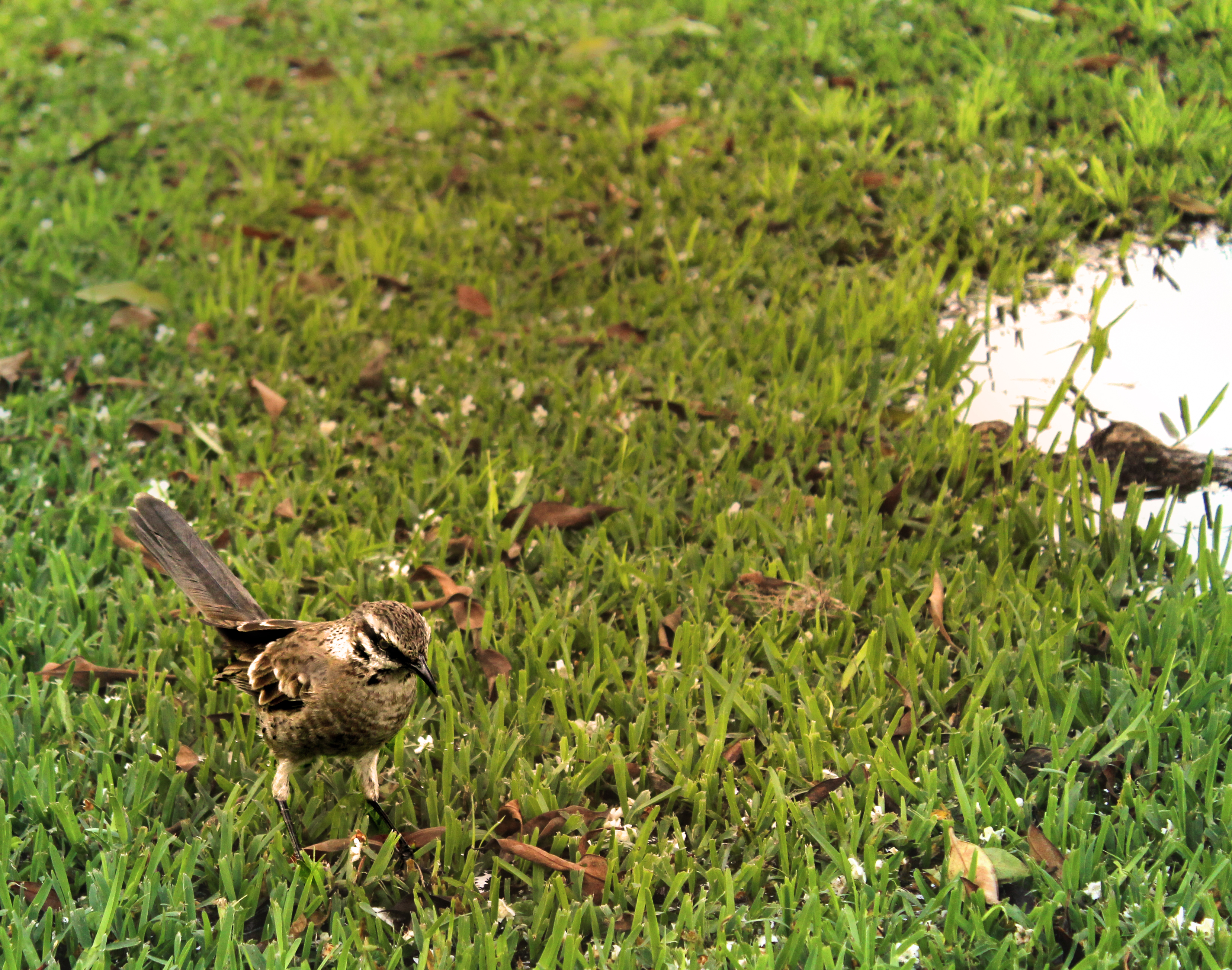 Mimus Longicaudutus o calandria de cola larga en u parque de Lima, Perú